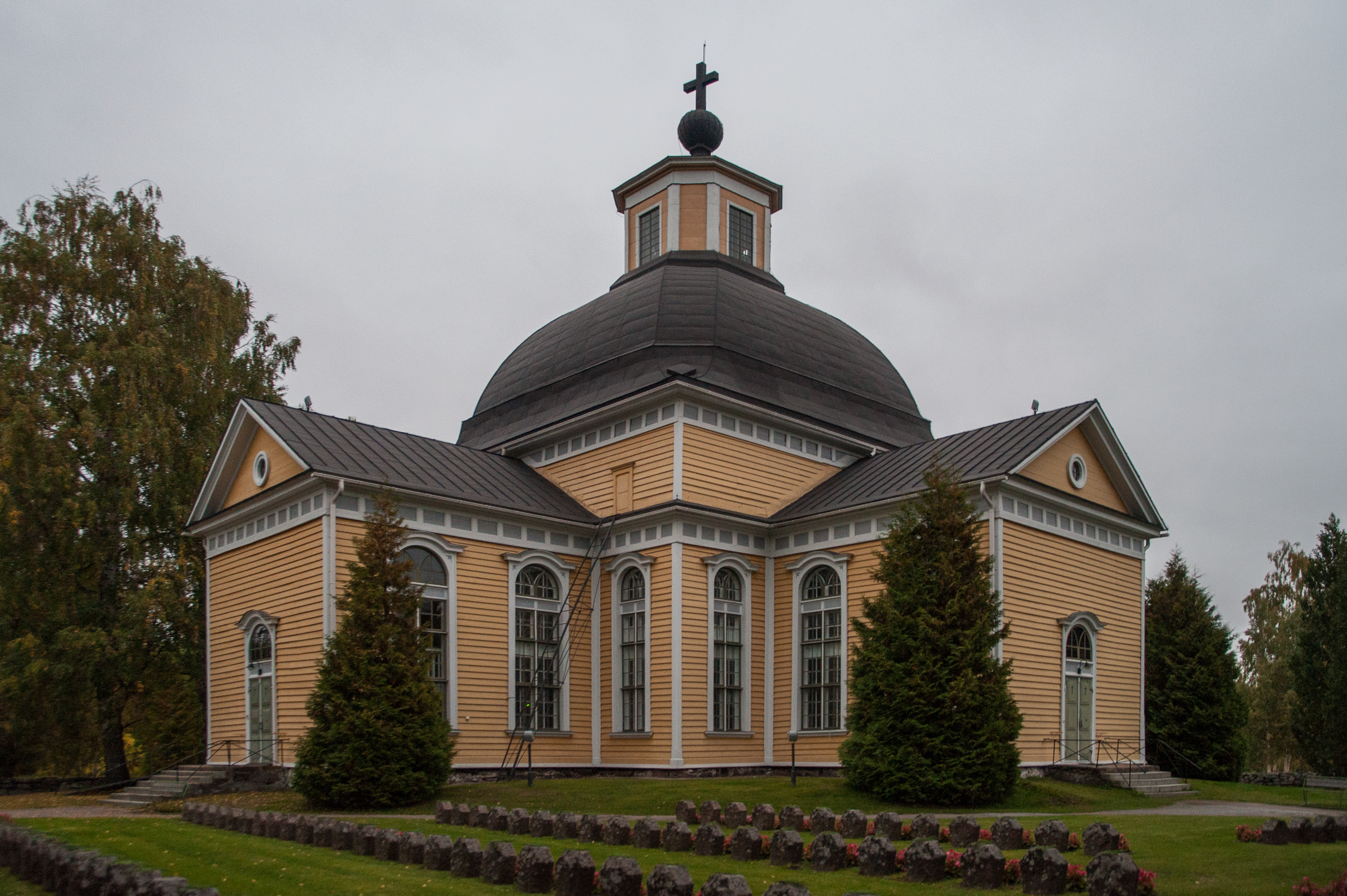 Taipalsaaren kirkko; kirkkorakennus Taipalsaarella